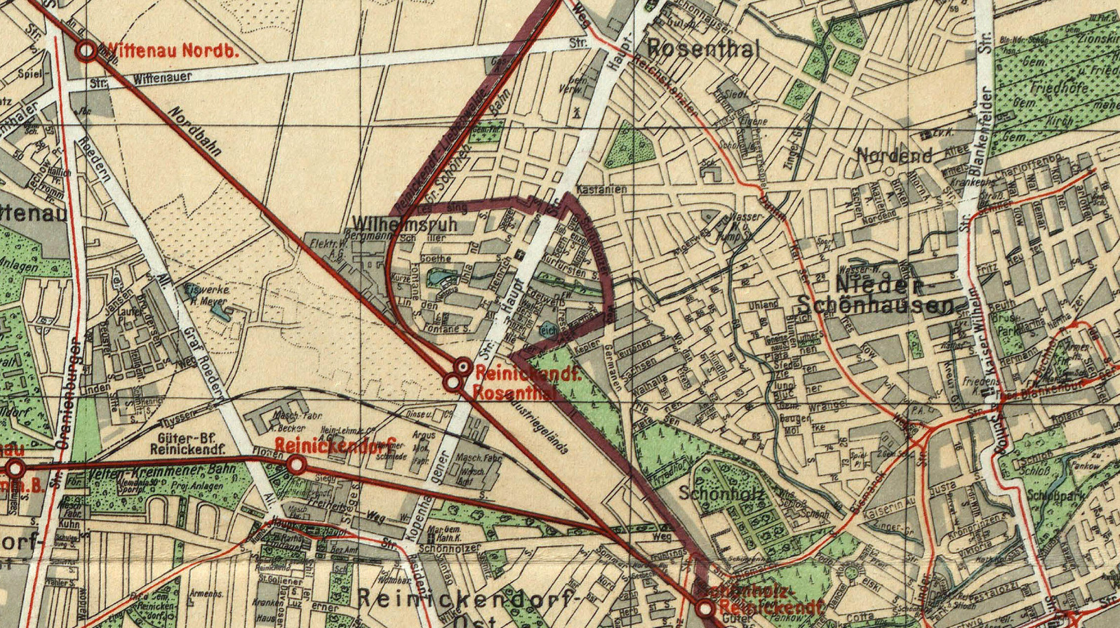 Silva-Übersichtsplan von der Stadt Berlin und ihren 20 Verwaltungsbezirken : auf Grund des Gesetzes vom 27. April 1920 / bearb. und hrsg. von Willy Holz * Format: ca 163 x 117 cm * Orientierung: Nord * Maßstab: 1: 30 000 (Innenstadt 1: 20 000) * 2 Blätter, mehrfarbig